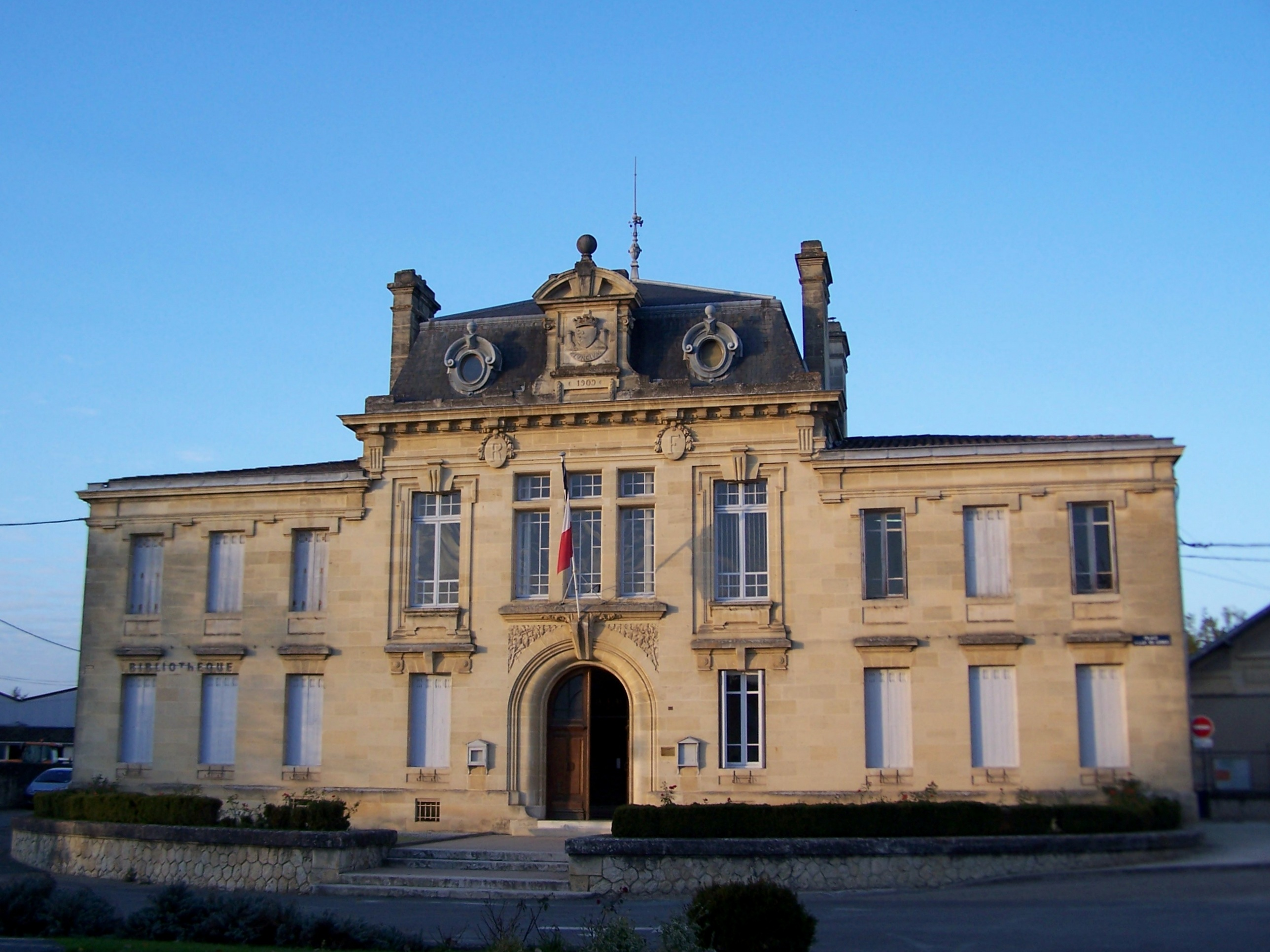 Mairie de Rions (Gironde, France)